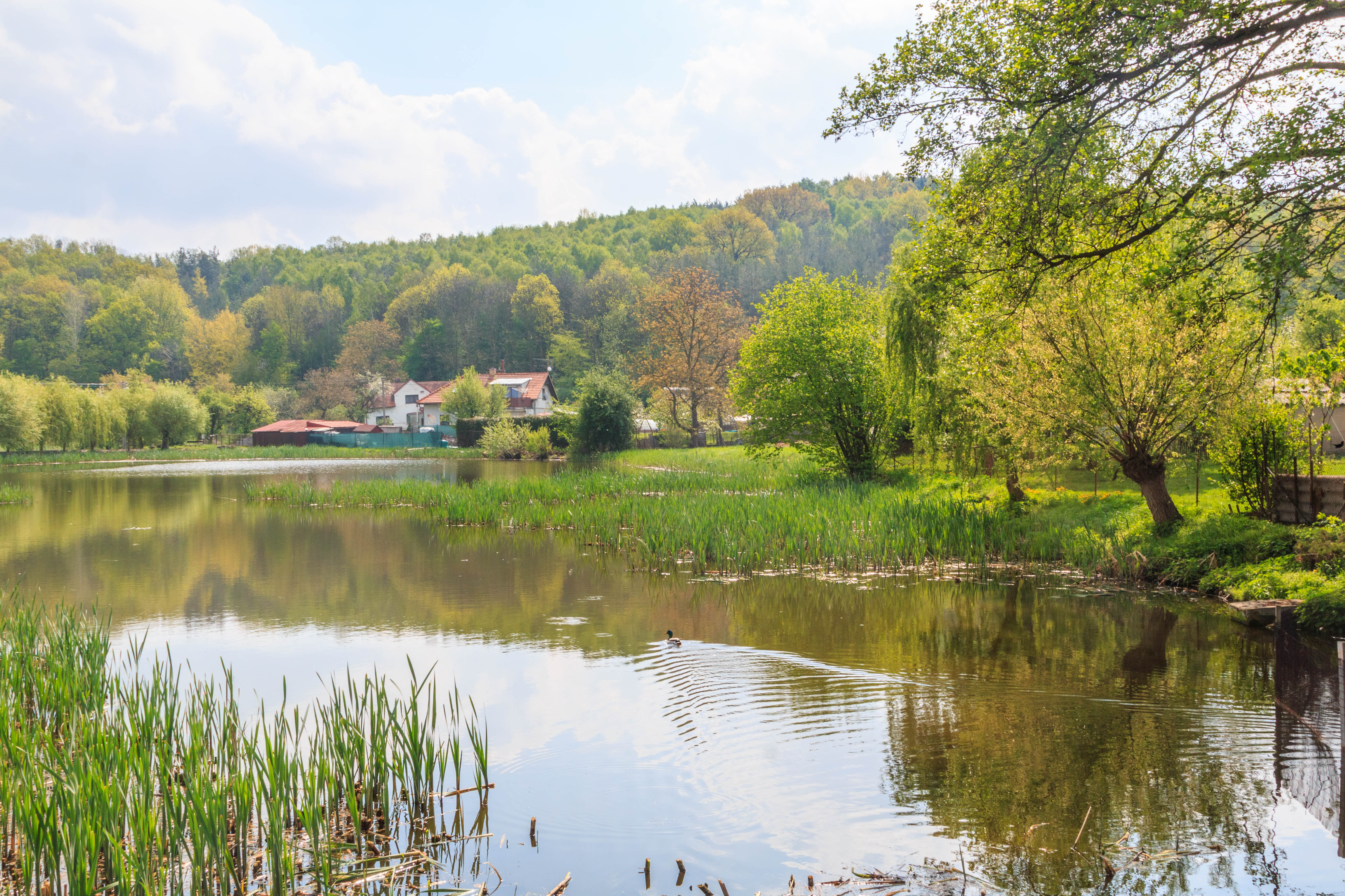 Mlýnský rybník v Brlohu Project: Vodstvo.